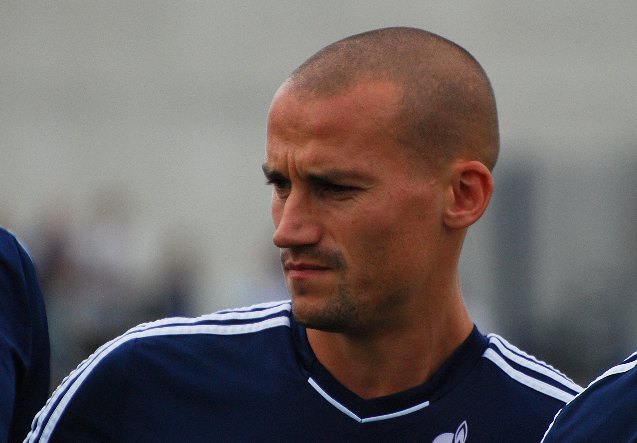 Peer Kluge